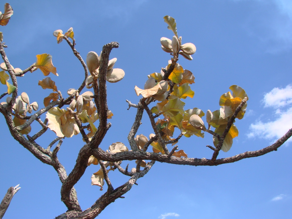 Aspidosperma macrocarpon - APOCYNACEAE Cristalina - Goiás - Brasil.